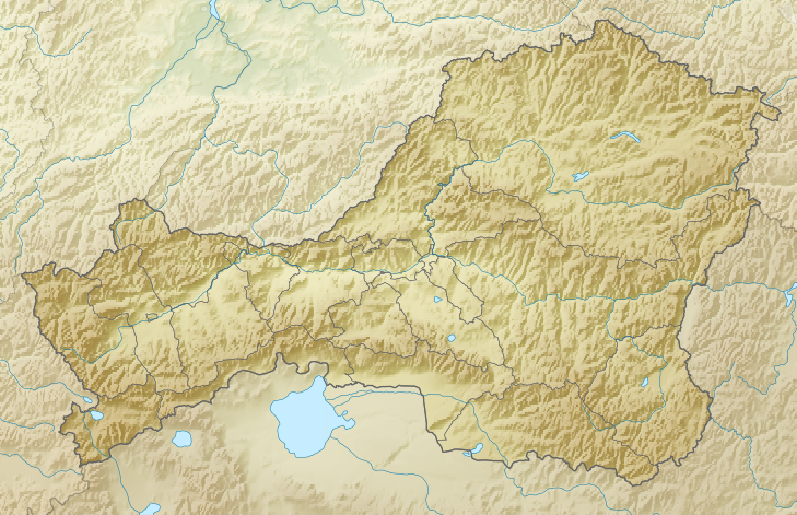 Физическая карта республики Тыва (Тува), Россия. Координаты границ для GMT: -R88.5/99.5/49.5/53.9 Инструменты: GMT, Inkscape This map may be incomplete, and may contain errors. Don't rely solely on it for navigation.